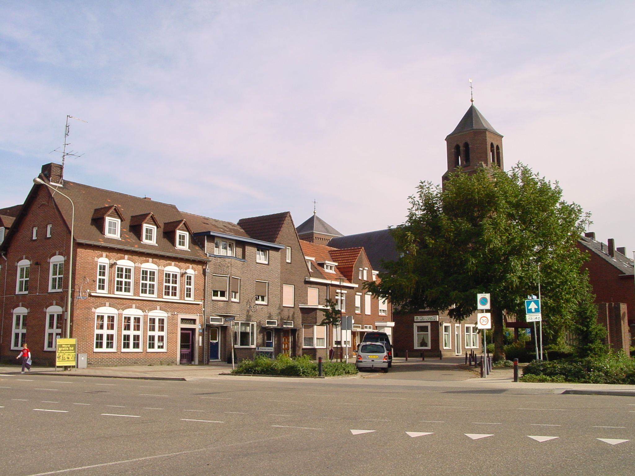 Ik heb deze foto zelf gemaakt op 22 September 2006